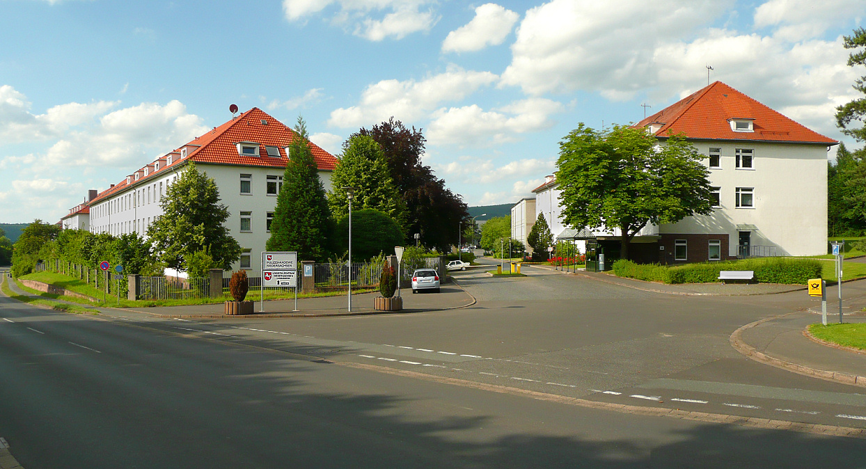 Polizeiakademie Abteilung Hann. Münden